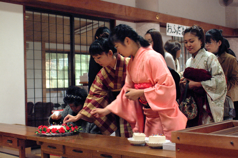 淡島神社の説明用として。